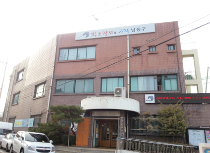 간석4동 주민센터